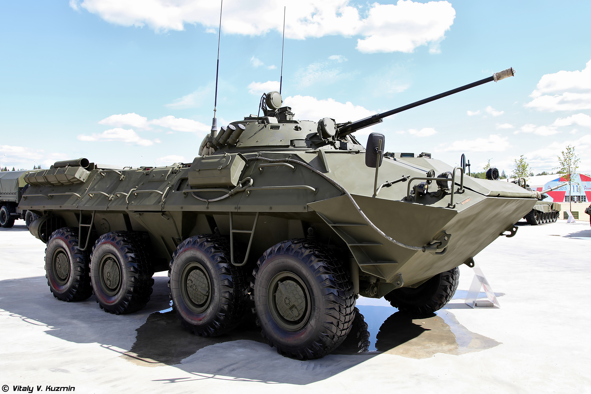 БТР-90 (BTR-90)